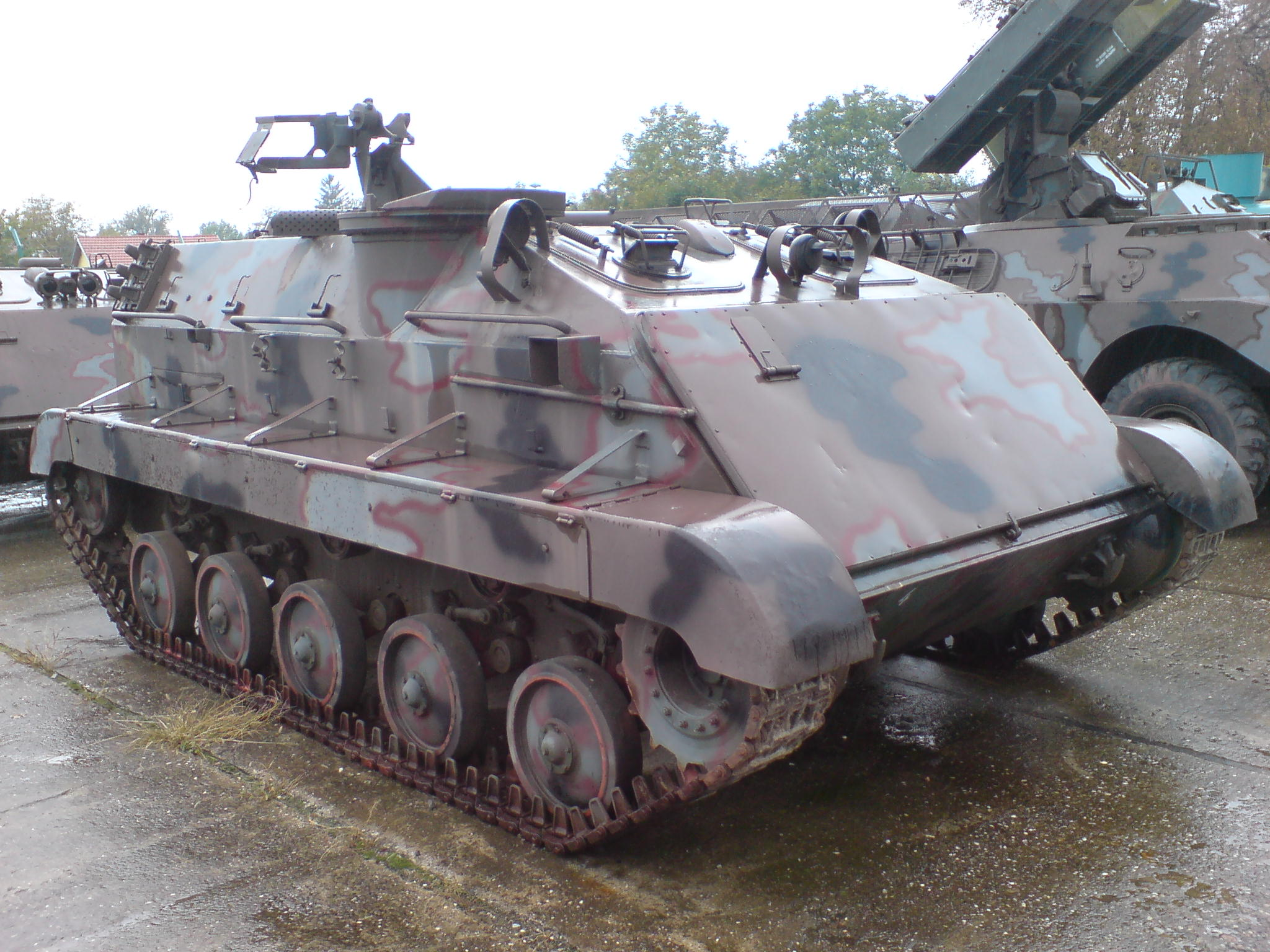 Transporter M-60 u vukovarskoj vojarni